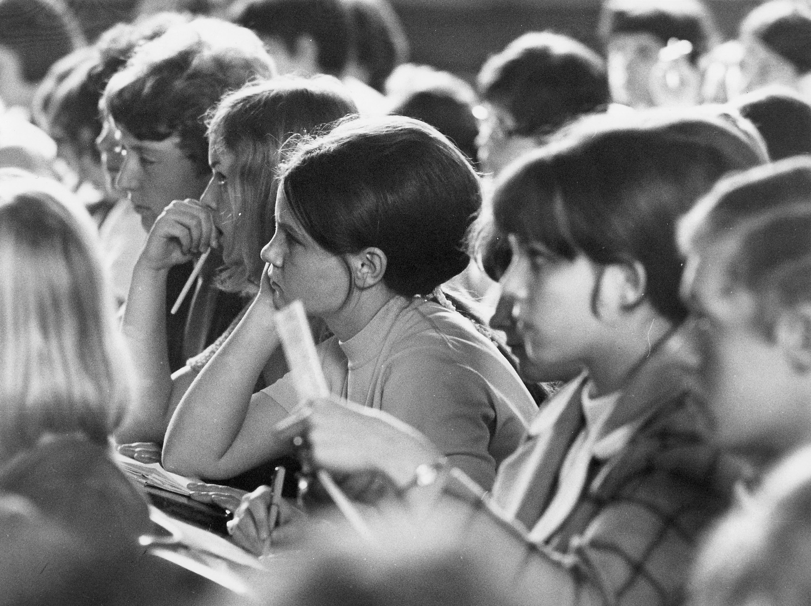 HfÖ - Hörsaal